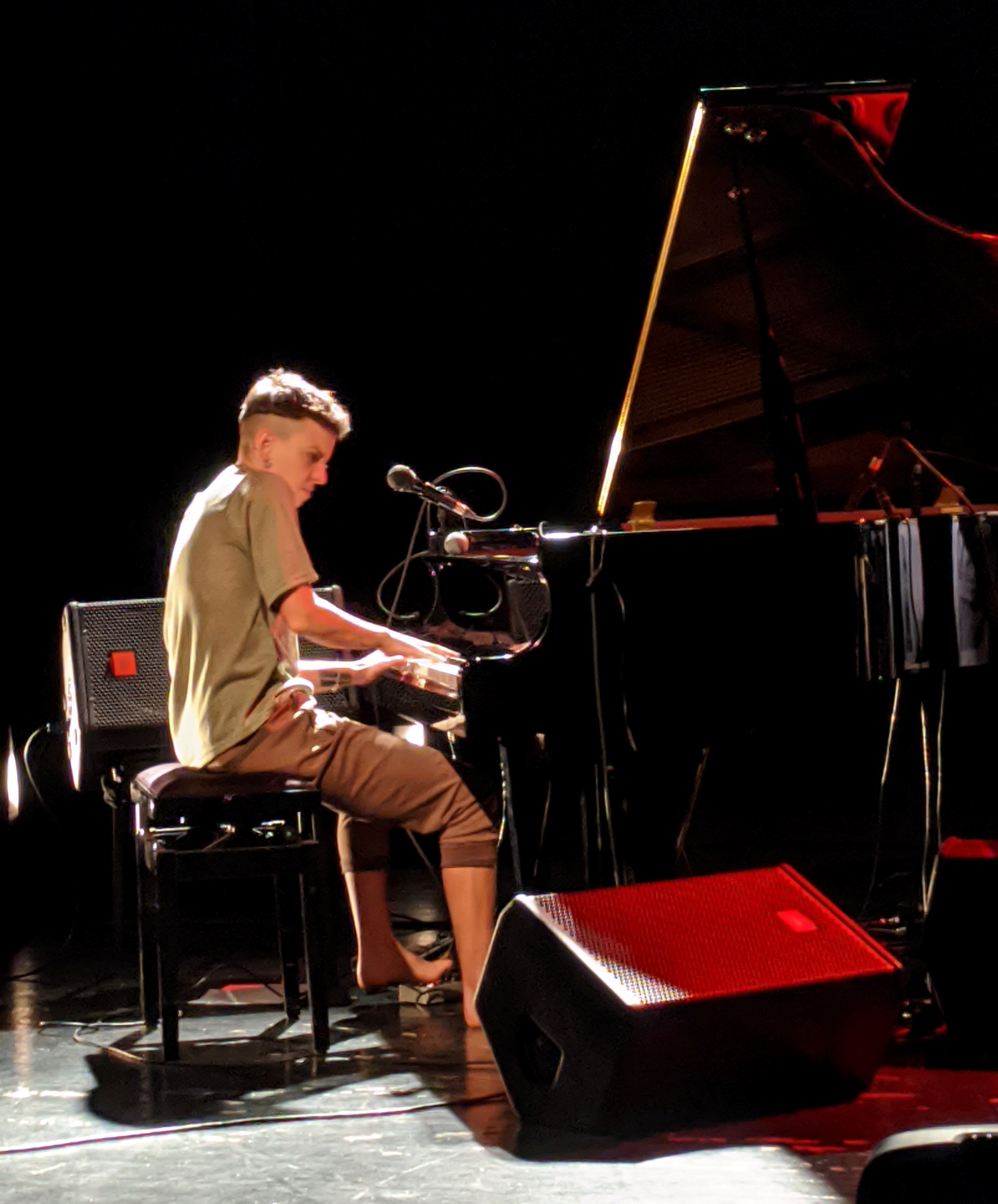 Clara Peya pianojole eta konpositorea Sopelako Kurtzio Kulturetxeko emanaldian.